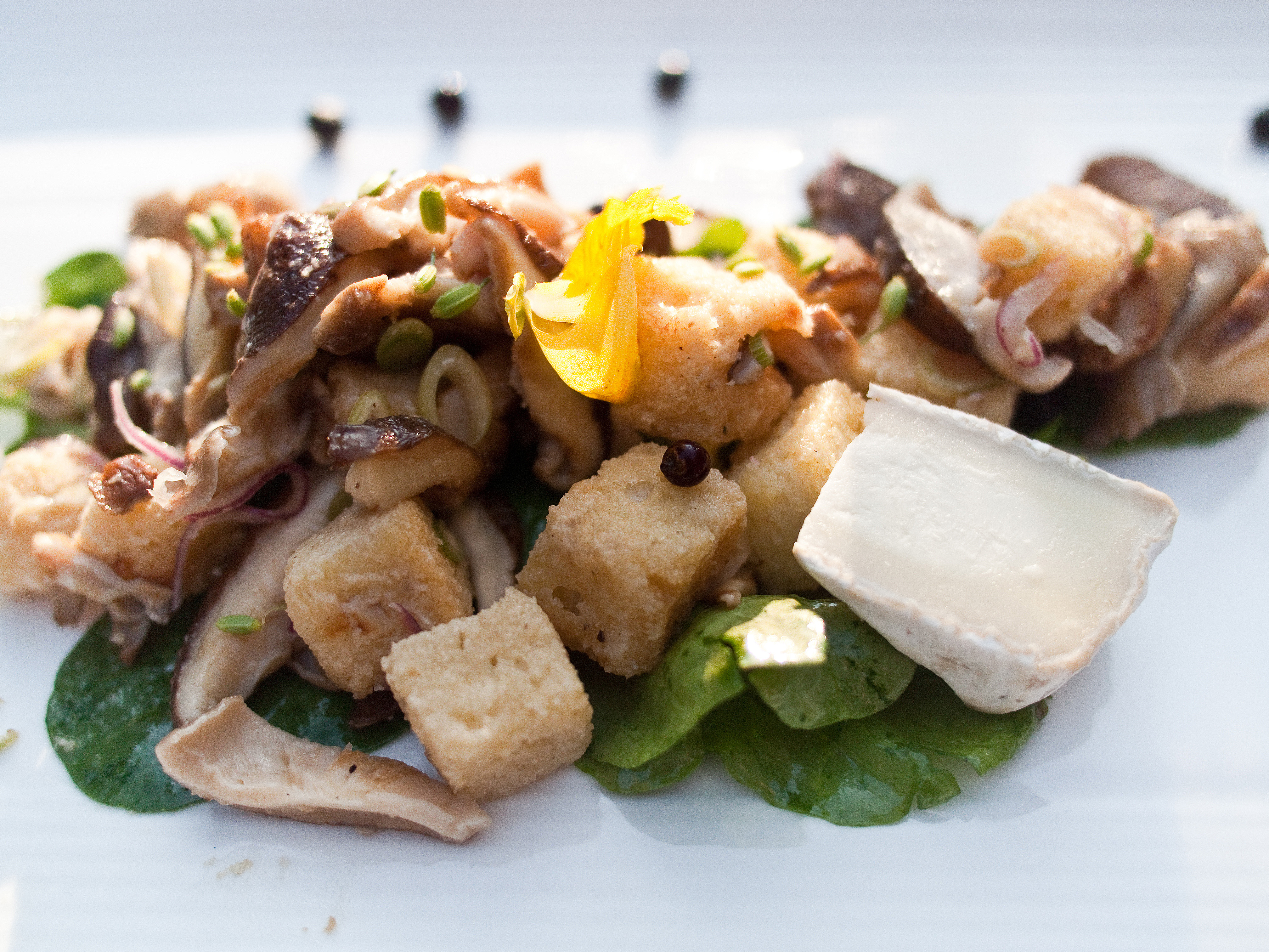 Panzanella avec Tavel 2005